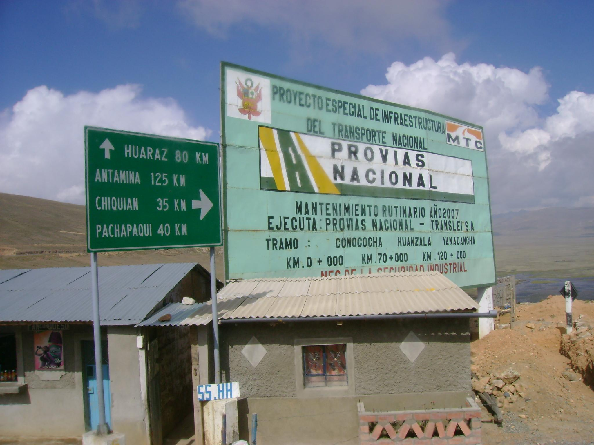 Direcciones